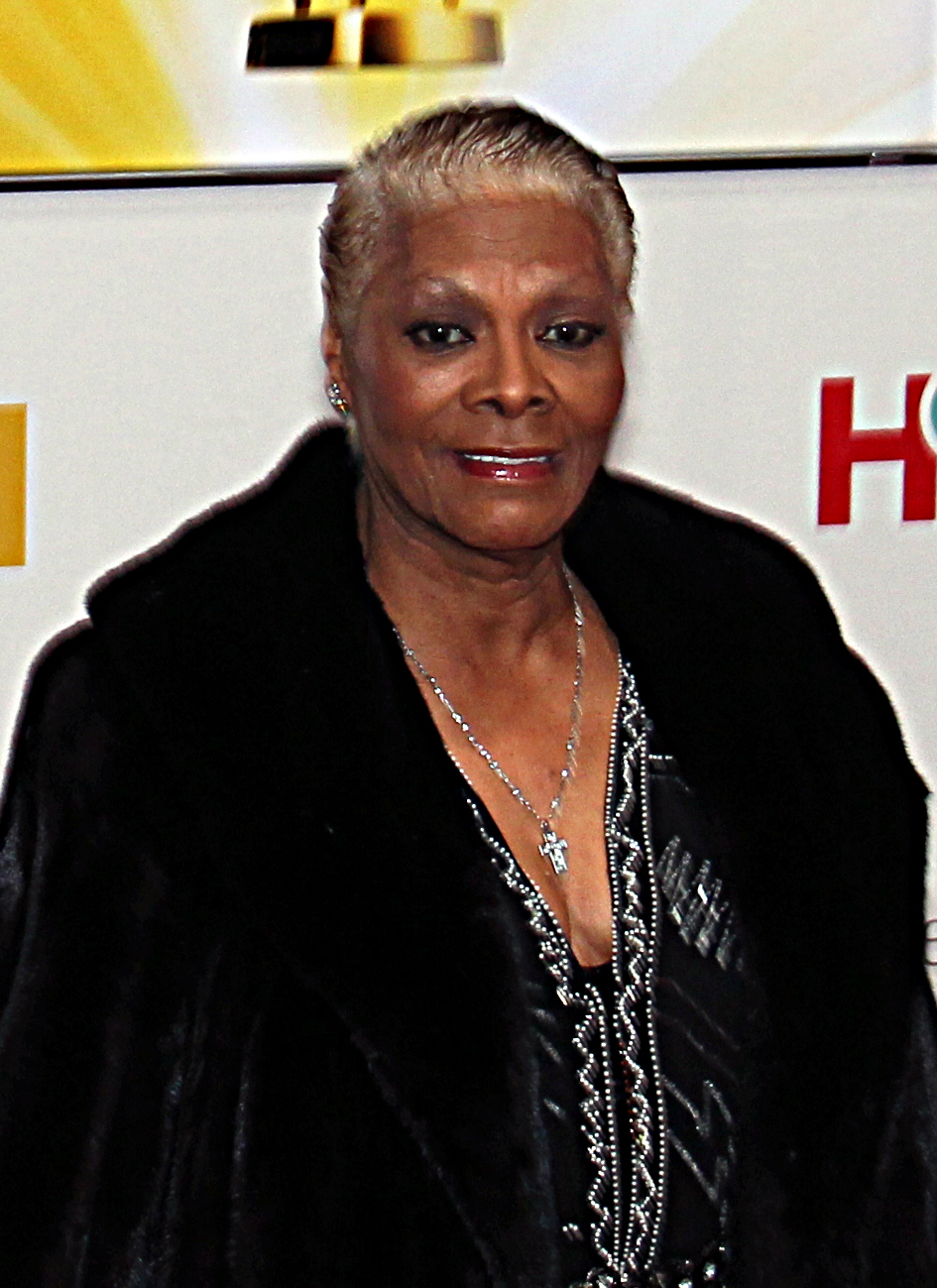 Dionne Warwick bei der Goldenen Kamera 2012